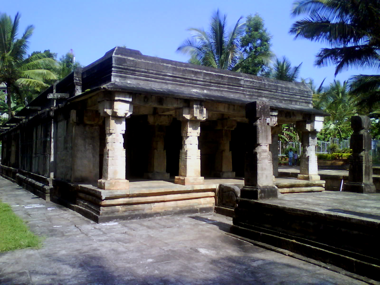 ജൈന ക്ഷേത്രം